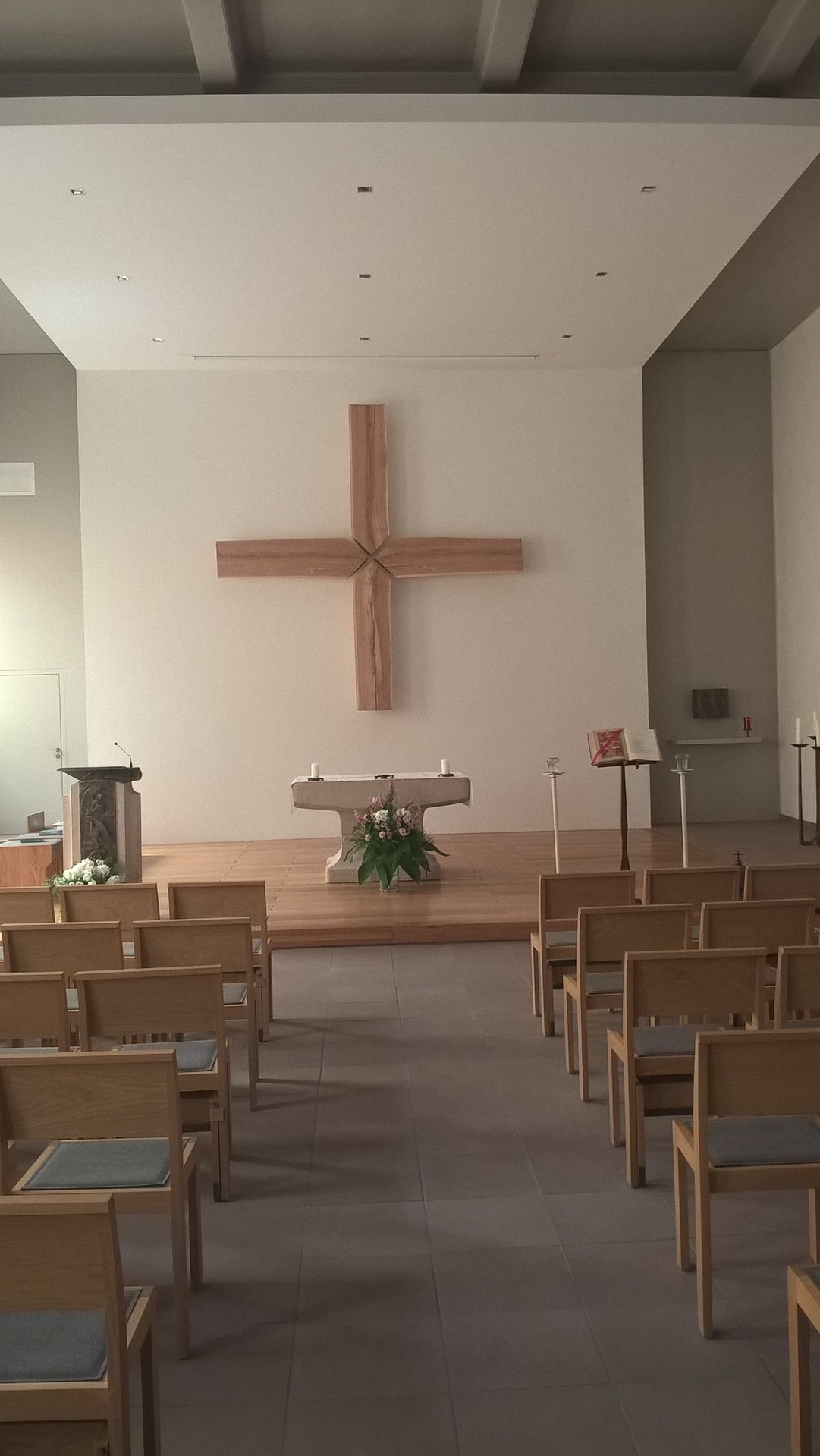 St.-Michael-Kirche in Leer, Ostfriesland